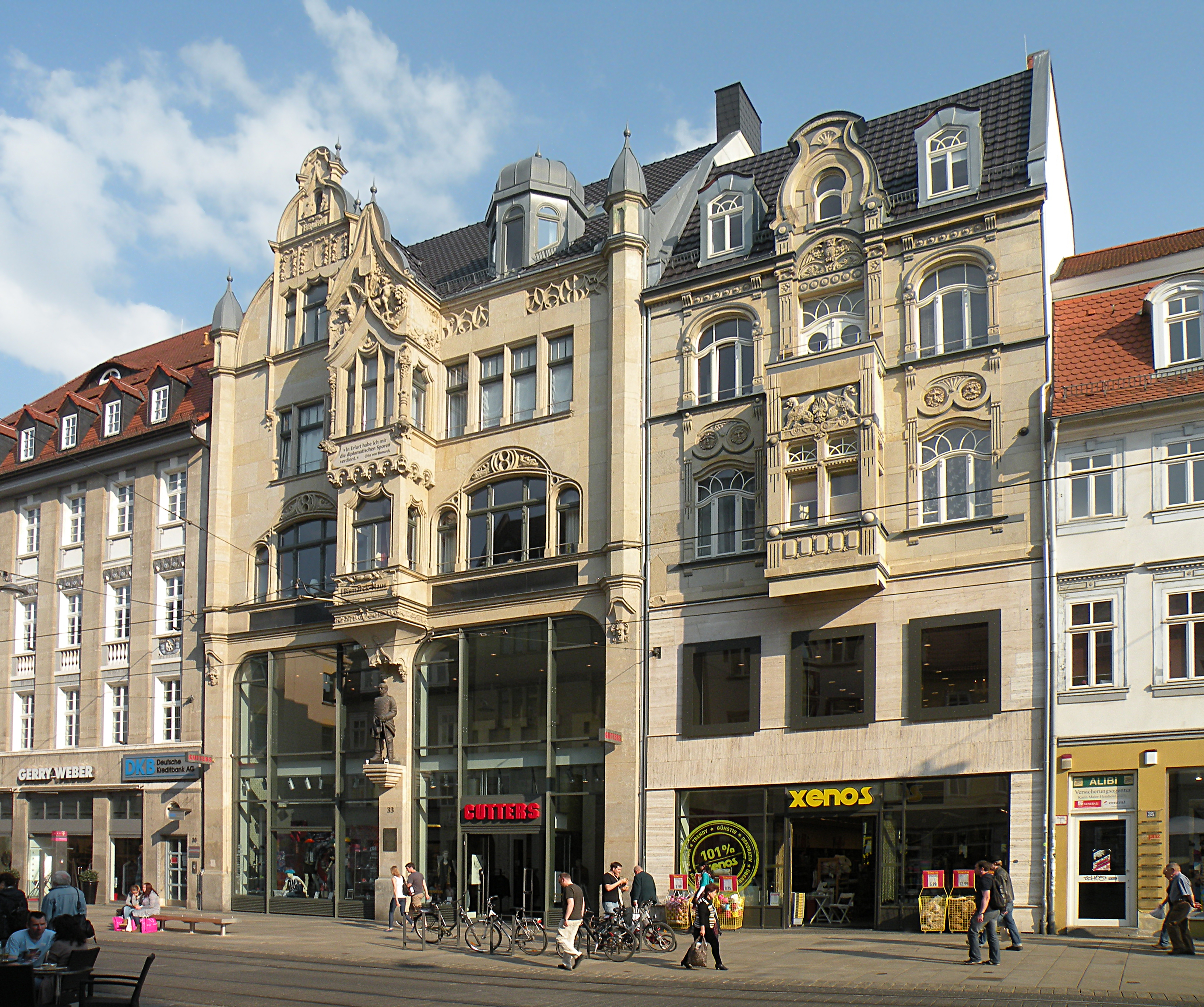 Здание в стиле неоренессанса с памятником Бисмарку на Ангере